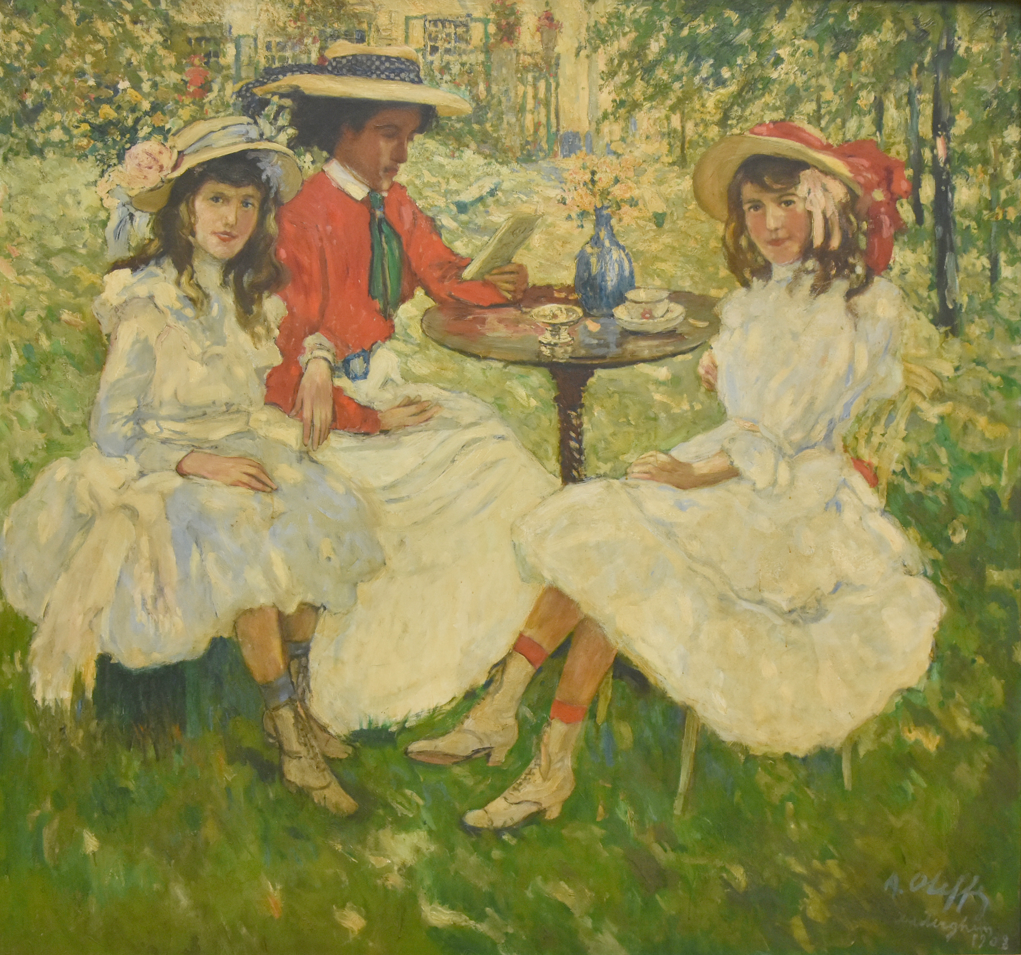 Auguste Oleffe (1867-1931) Meimaand (1908) MSK Gent